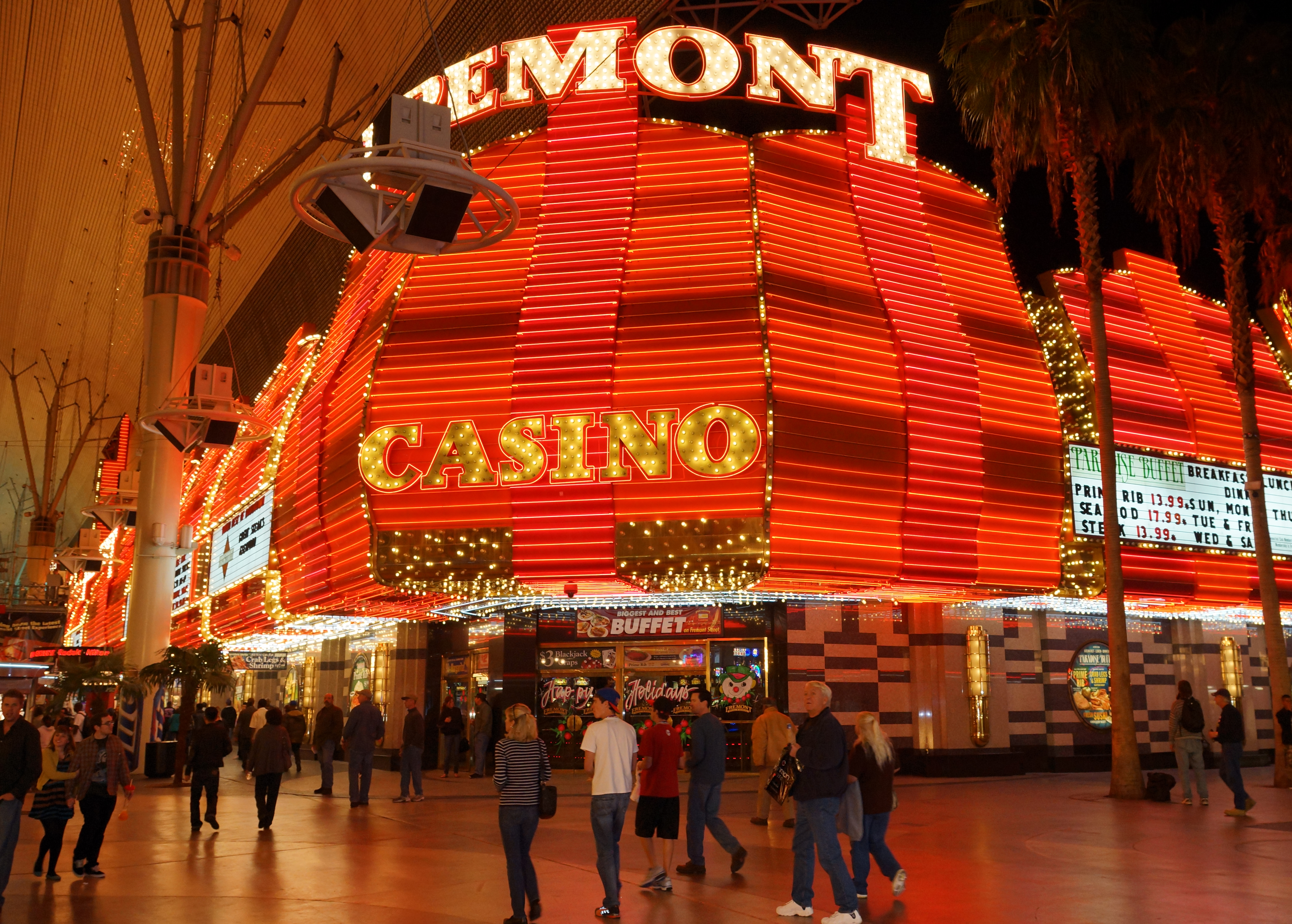 Freemont Street, Las Vegas